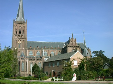 Zelf gemaakt, GNU